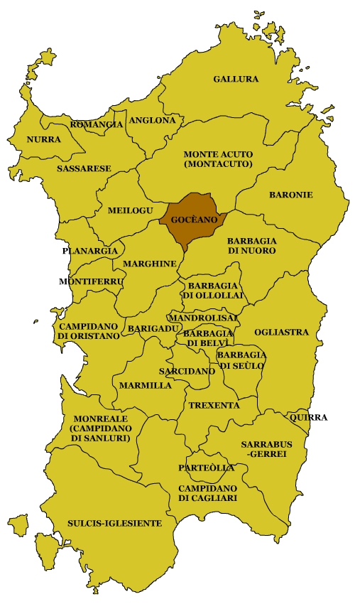 Sardinian Subregions